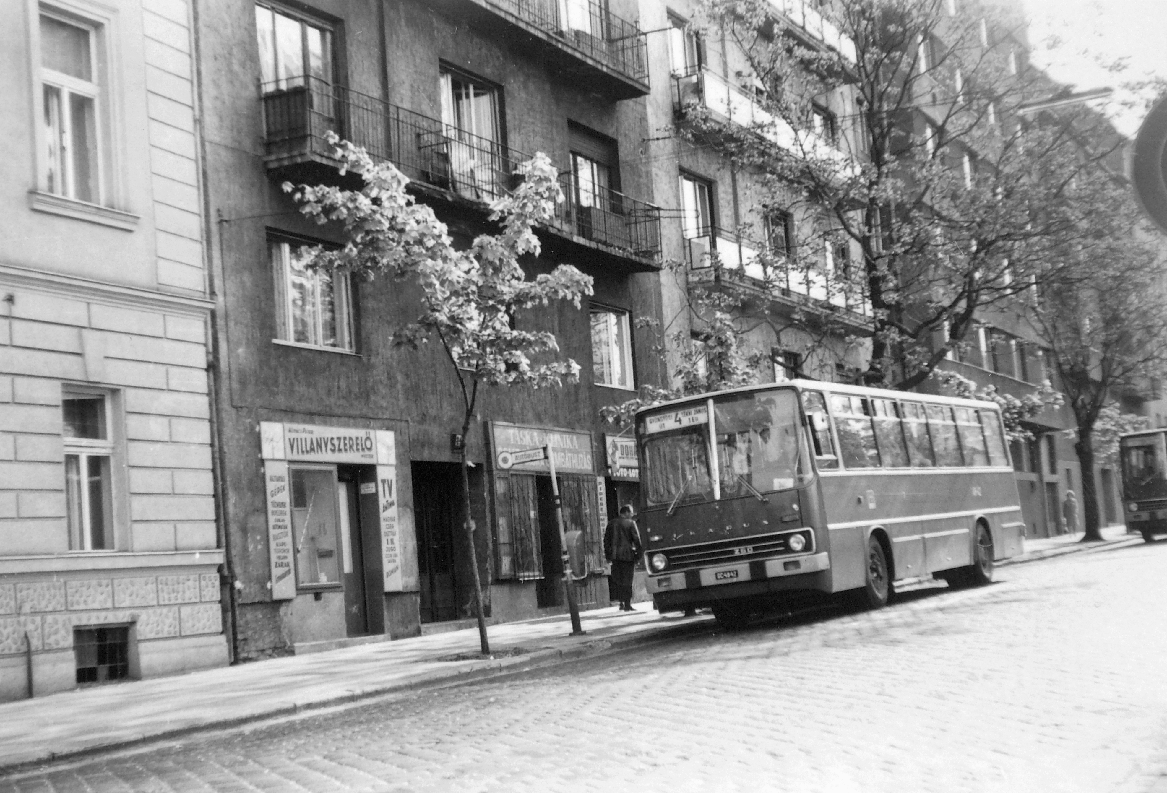 Márvány utca a Győri út és az Alkotás utca között. Location: Hungary, Budapest XII. Tags: bus, Ikarus-brand, Hungarian brand, street view, spring, store display, Budapest Title: Márvány utca a Győri út és az Alkotás utca között.